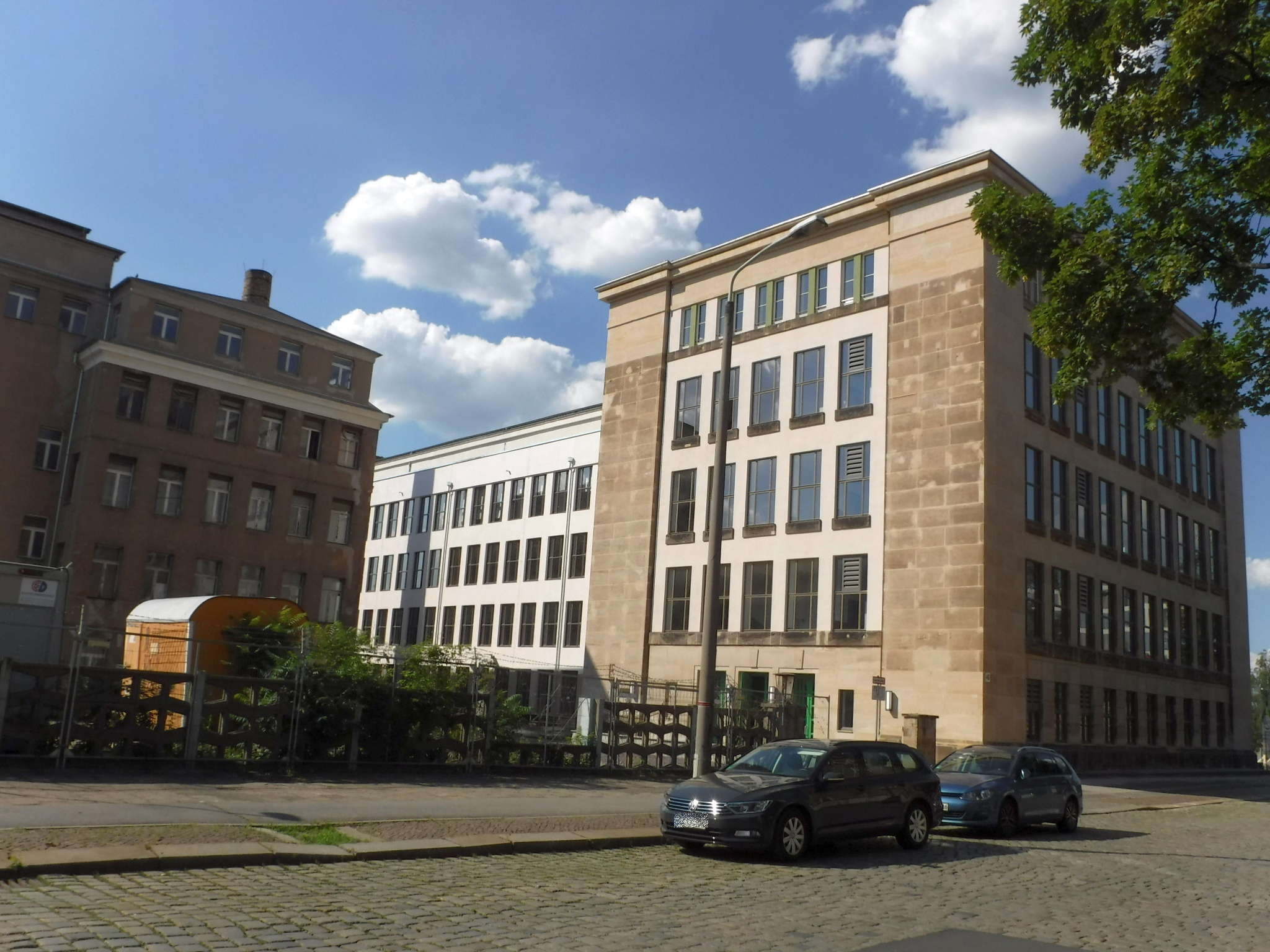 Universelle-Werke Dresden. Haus E Zwickauer Straße 46. Ostteil.